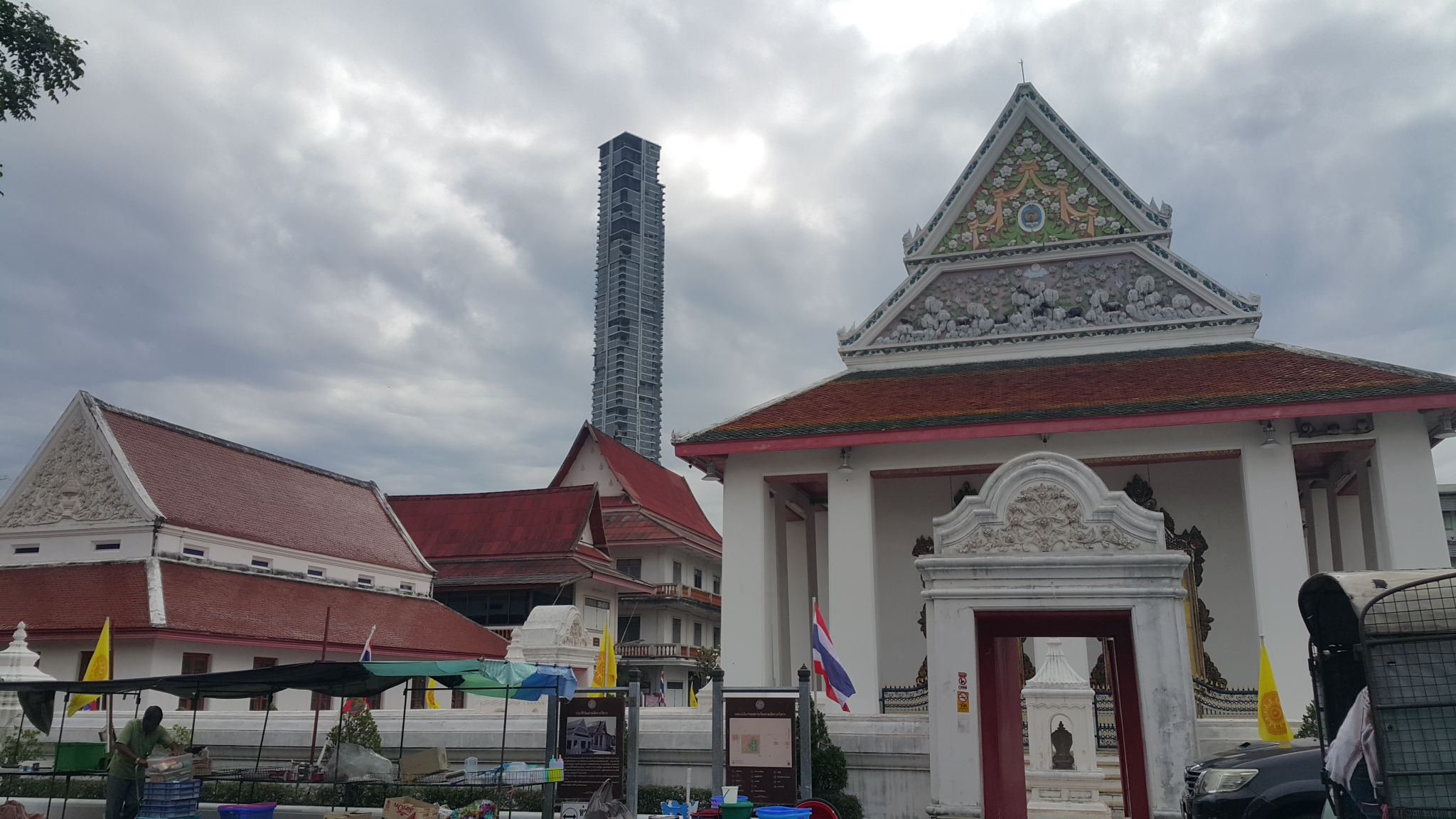 วัดเศวตฉัตรวรวิหาร พระอารามหลวงชั้นตรี ใน เขตคลองสาน กรุงเทพมหานคร